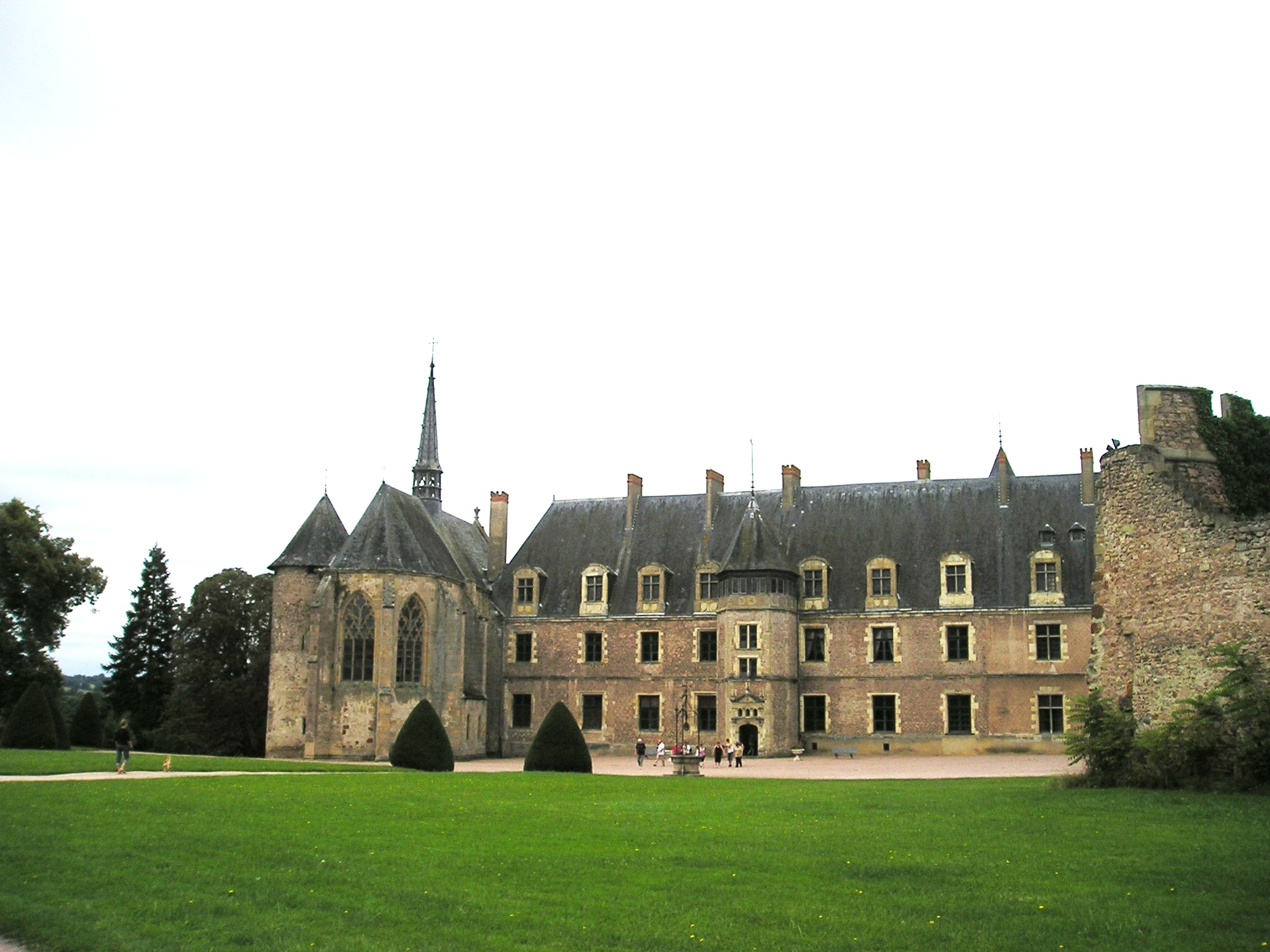 Château Lapalisse (Puy-de-Dôme), Rückfront